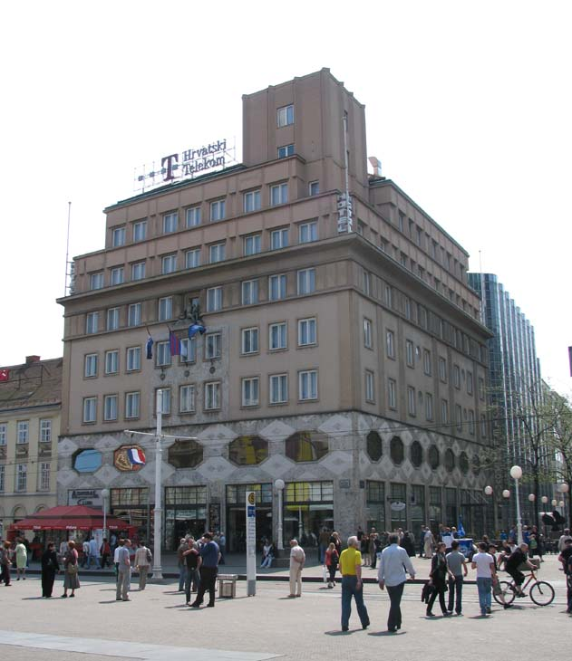 Hotel Dubrovnik Zagreb